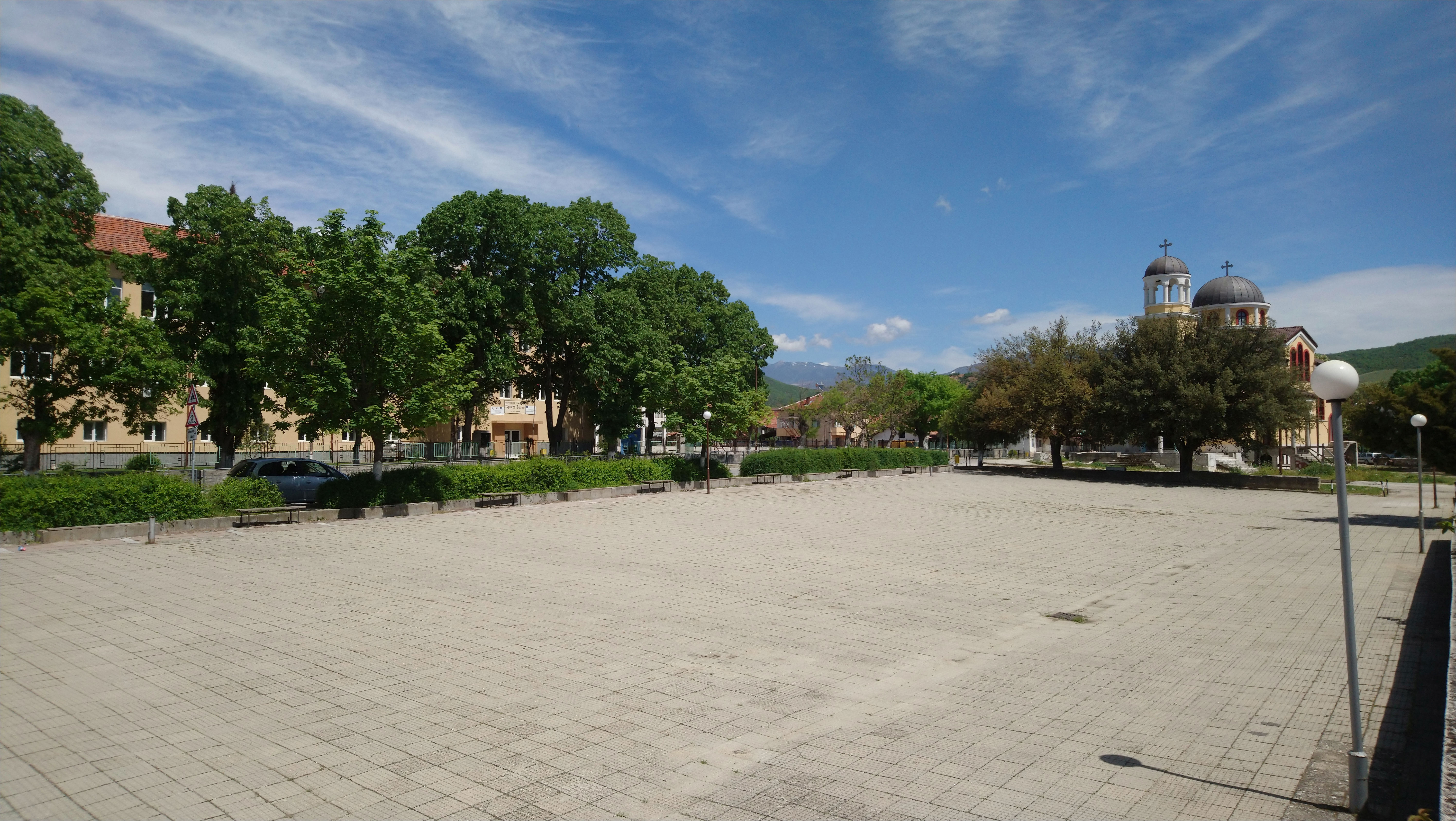 Центърът на село Катунци